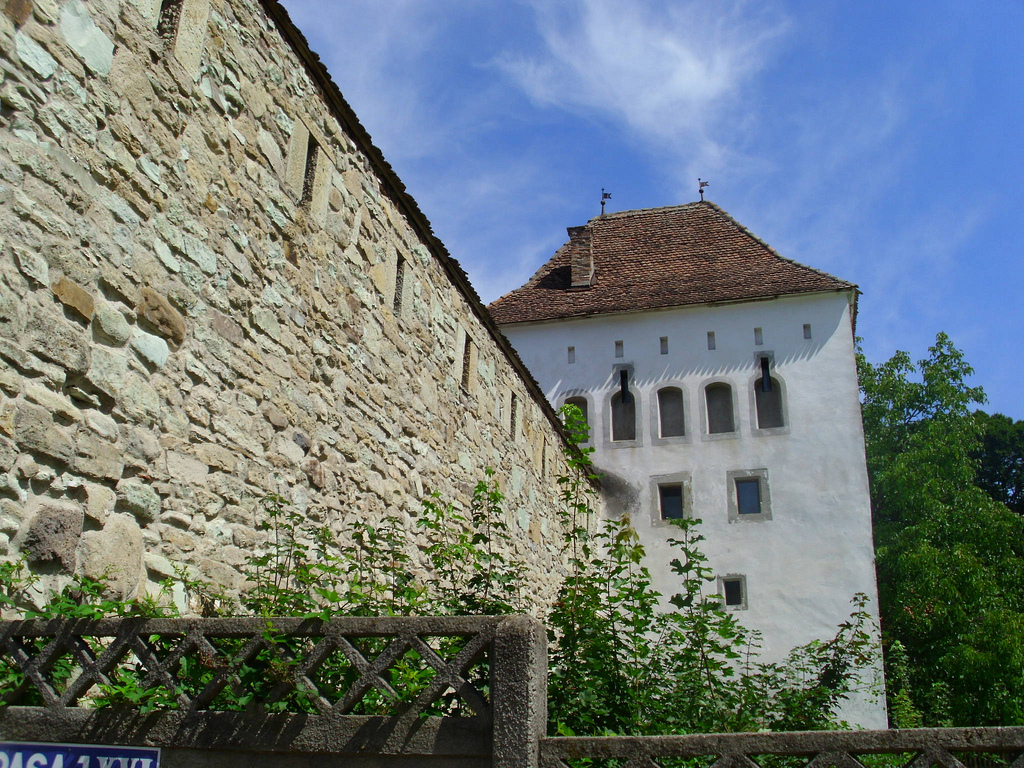 Fassbinterturm